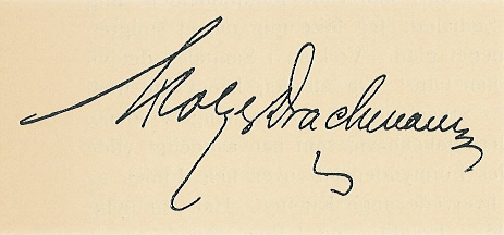 Holger Drachmanns autograf.